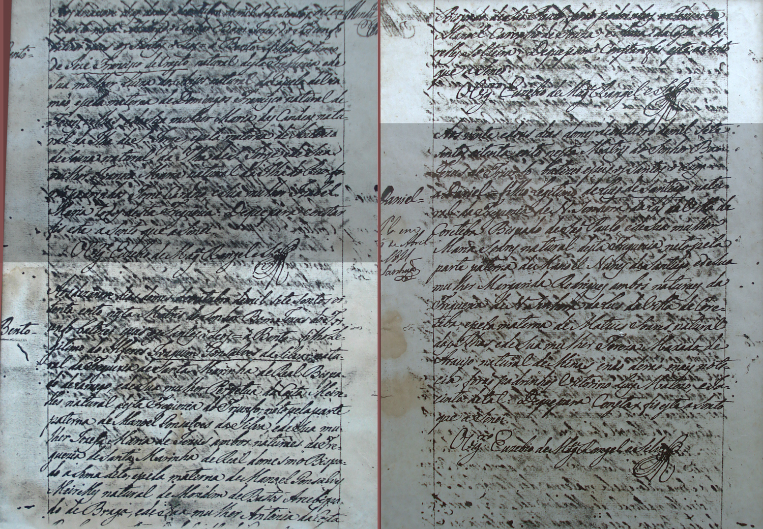 Réplica frente e verso da folha com o assentamento de batismo de Bento Gonçalves nos arquivos da Igreja Bom Jesus em Triunfo, Rio Grande do Sul, Brasil. A parte referente a Bento Gonçalves está realçada mais clara. A transcrição é a seguinte: "Bento Aos dezenove dias do mez de outubro de mil setecentos oitenta e oito nesta Matriz do Senhor Bom Jesus do Triunfo batizei e pus os santos óleos = á Bento = filho legítimo do Alferes Joaquim Gonsalves da Silva, natural da Freguezia de Santa Marinha (Maria?) de Real Bispado de Lamego, e de sua mulher Perpetua da Costa Meirelles natural desta Freguezia do Triunfo, neto pela parte paterna de Manoel Gonsalves da Silva, e de sua mulher Josefa Maria de Jesus ambos naturaes da Freguezia de Santa Marinha de Real do mesmo Bispado acima dito, e pela materna de Manoel Gonsalves Meirelles natural de Mondim de Bastos Arcebispado de Braga, e de sua mulher Antónia da Costa Barbosa, natural da vila de Guaratinguetá, Bispado de São Paulo, foram padrinhos o Tenente Manoel Carvalho de Souza, e Anna da Costa Meirelles, solteira. Do que para constar fiz este assento que asinei. O Vig. Euzebio de Mag.es Rangel e Sá."